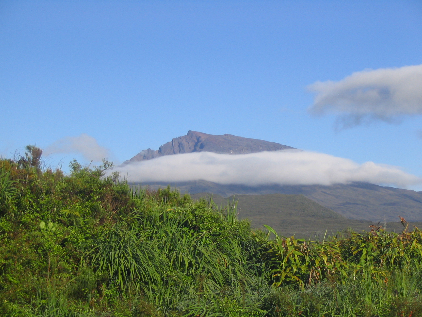 le Piton des Neiges vu depuis le Col de Bellevue